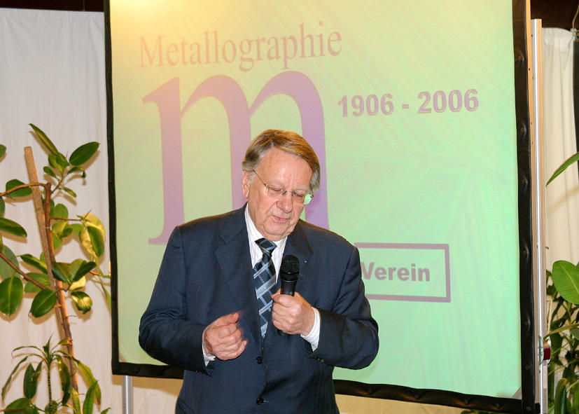 Prof. Petzow beim Grußwort zur 100-Jahrfeier der Metallografie des Lette-Vereins